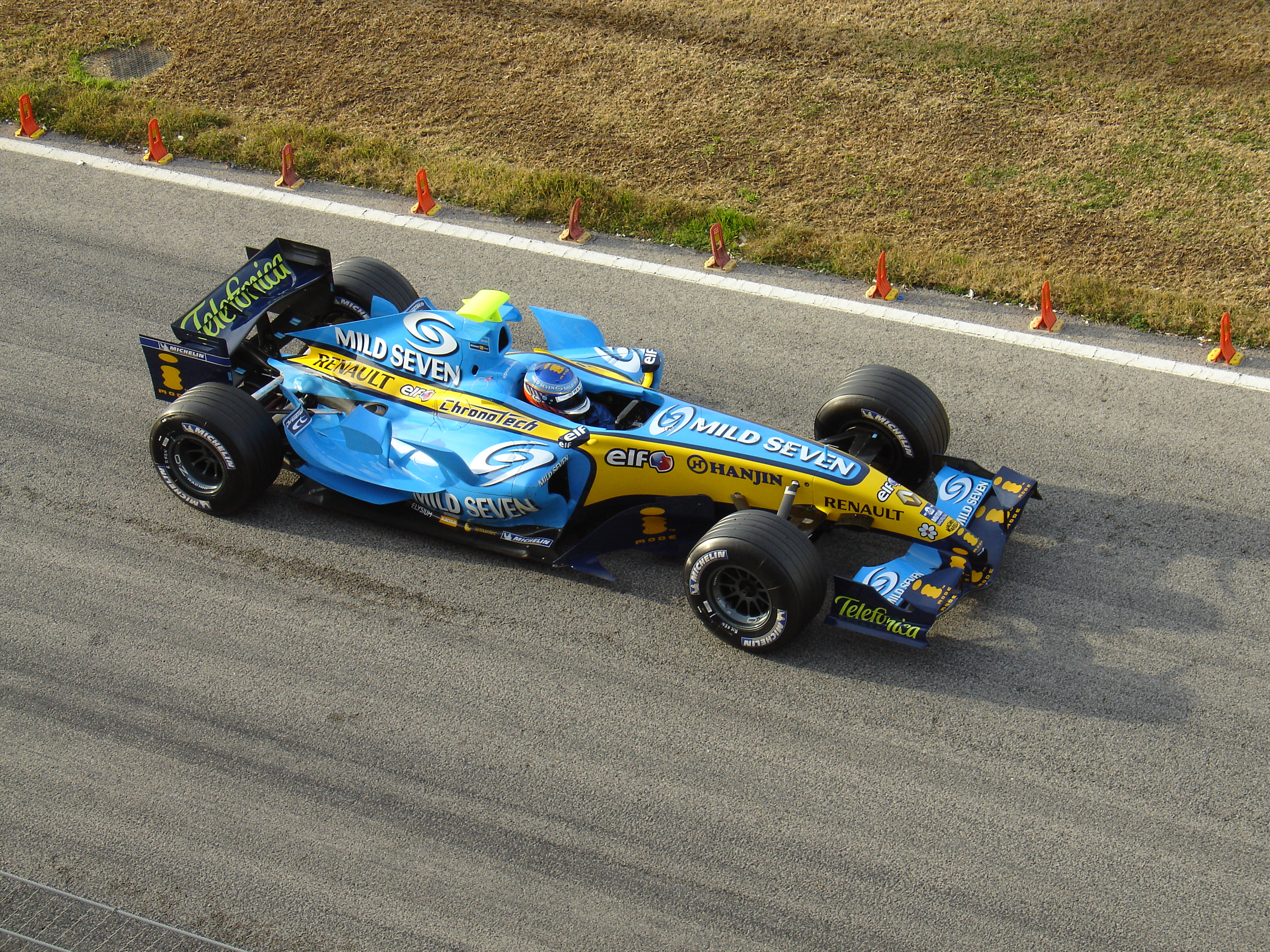 Heikki Kovalainen at Cheste Circuit (Valencia)